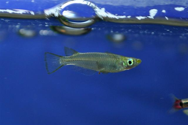 Медака китайська